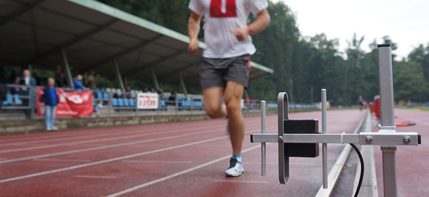 RFID čipová časomíra UHF IronTime. Anténa na boku je připravená sejmout čip závodníka, který proběhne cílovou linii.